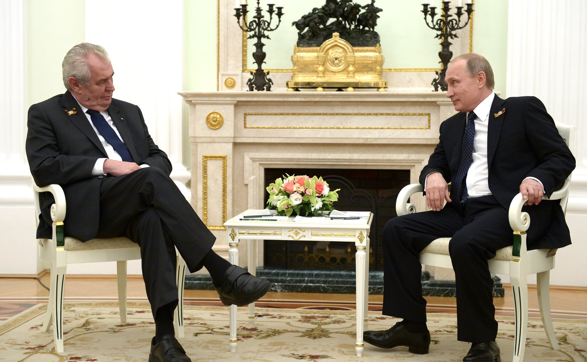 Встреча Владимира Путина с Президентом Чехии Милошем Земаном